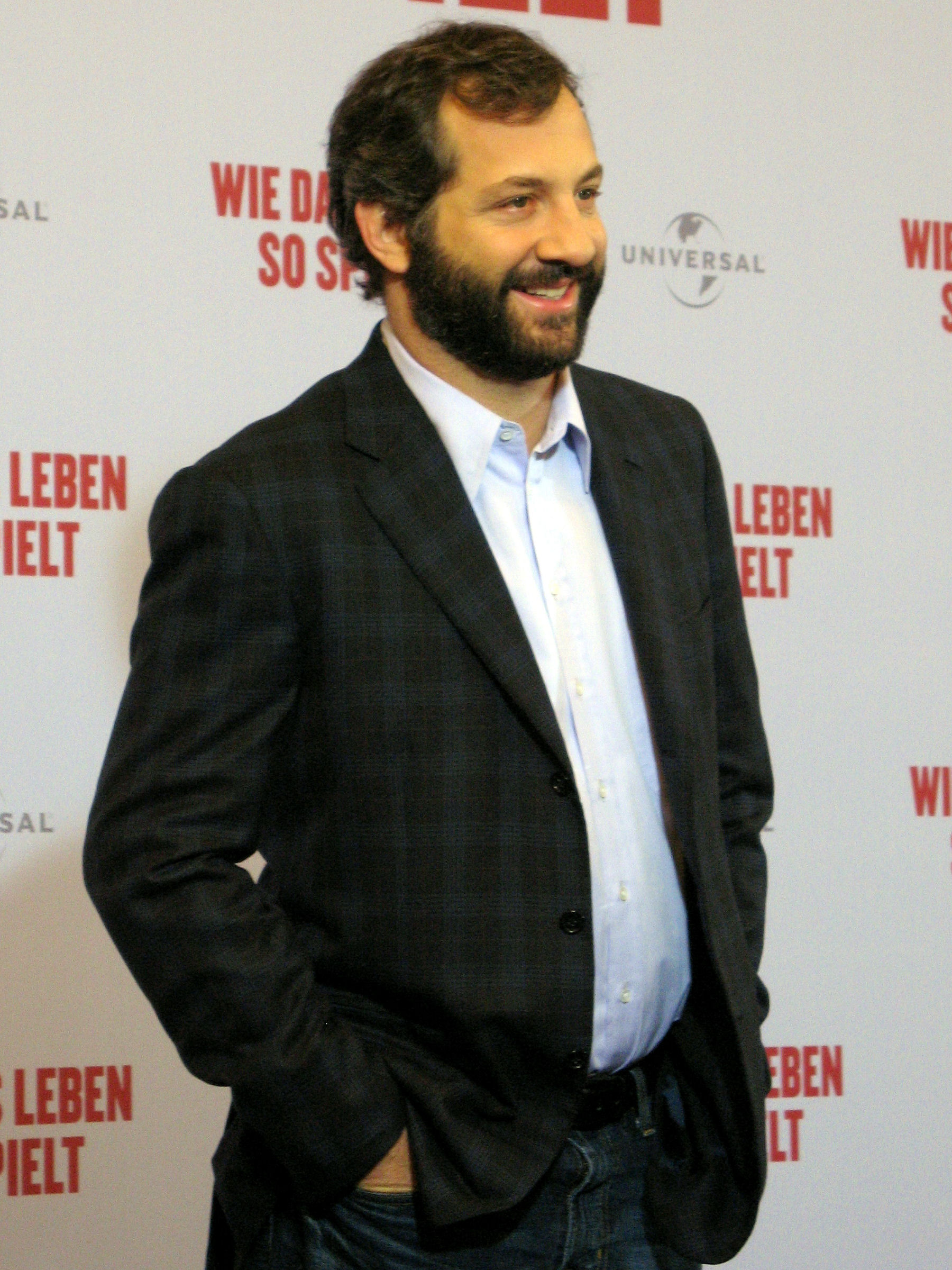 Judd Apatow in Berlin, 26.08.2009